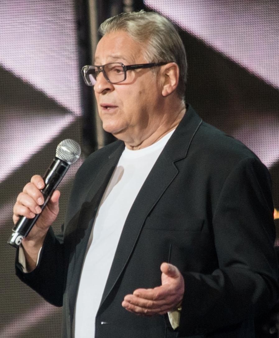 Геннадий Хазанов на репетиции фестиваля «Лайма. Рандеву. Юрмала 2017»